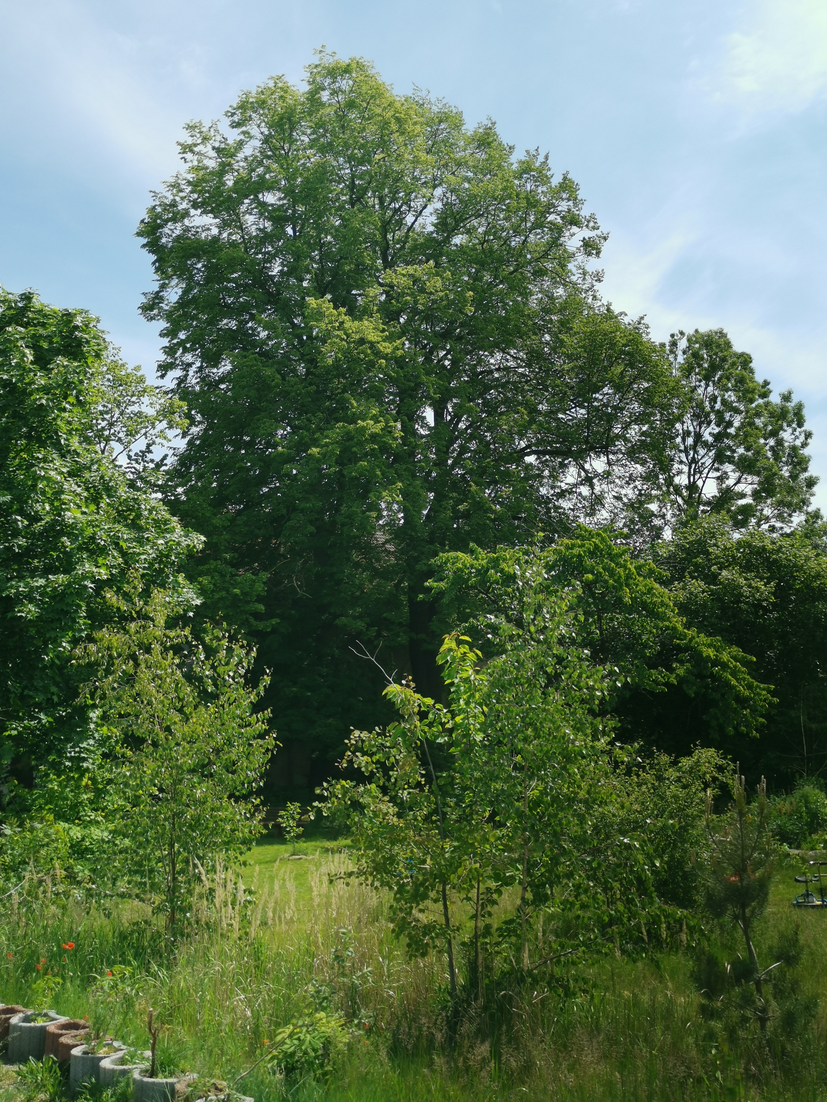 Zwei als Naturdenkmal geschützte Winterlinden am ehemaligen Gasthof in Grünewald